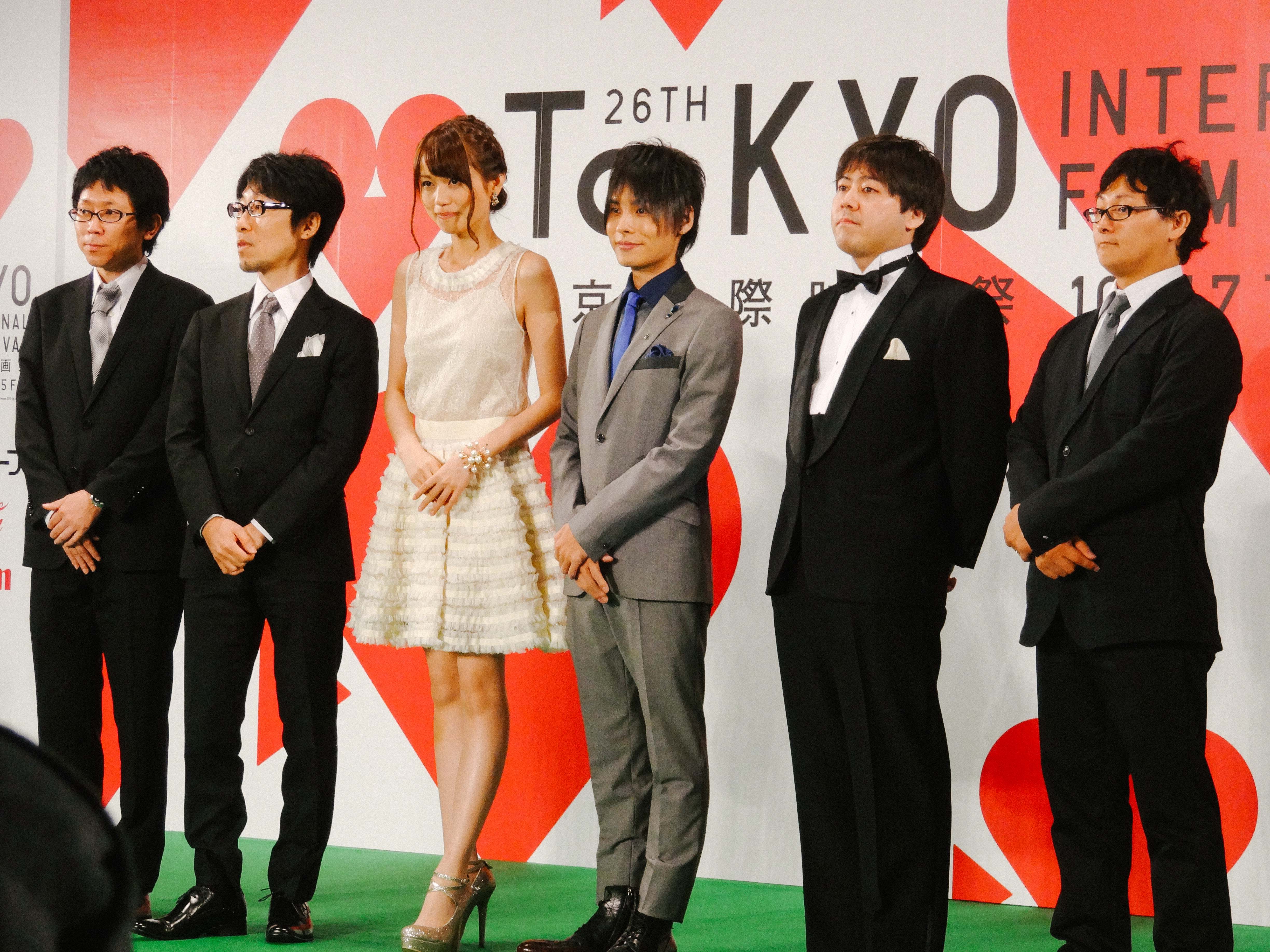 第26回 東京国際映画祭 藤井ゆきよ 岡本信彦 吉浦康裕 (サカサマのパテマ)